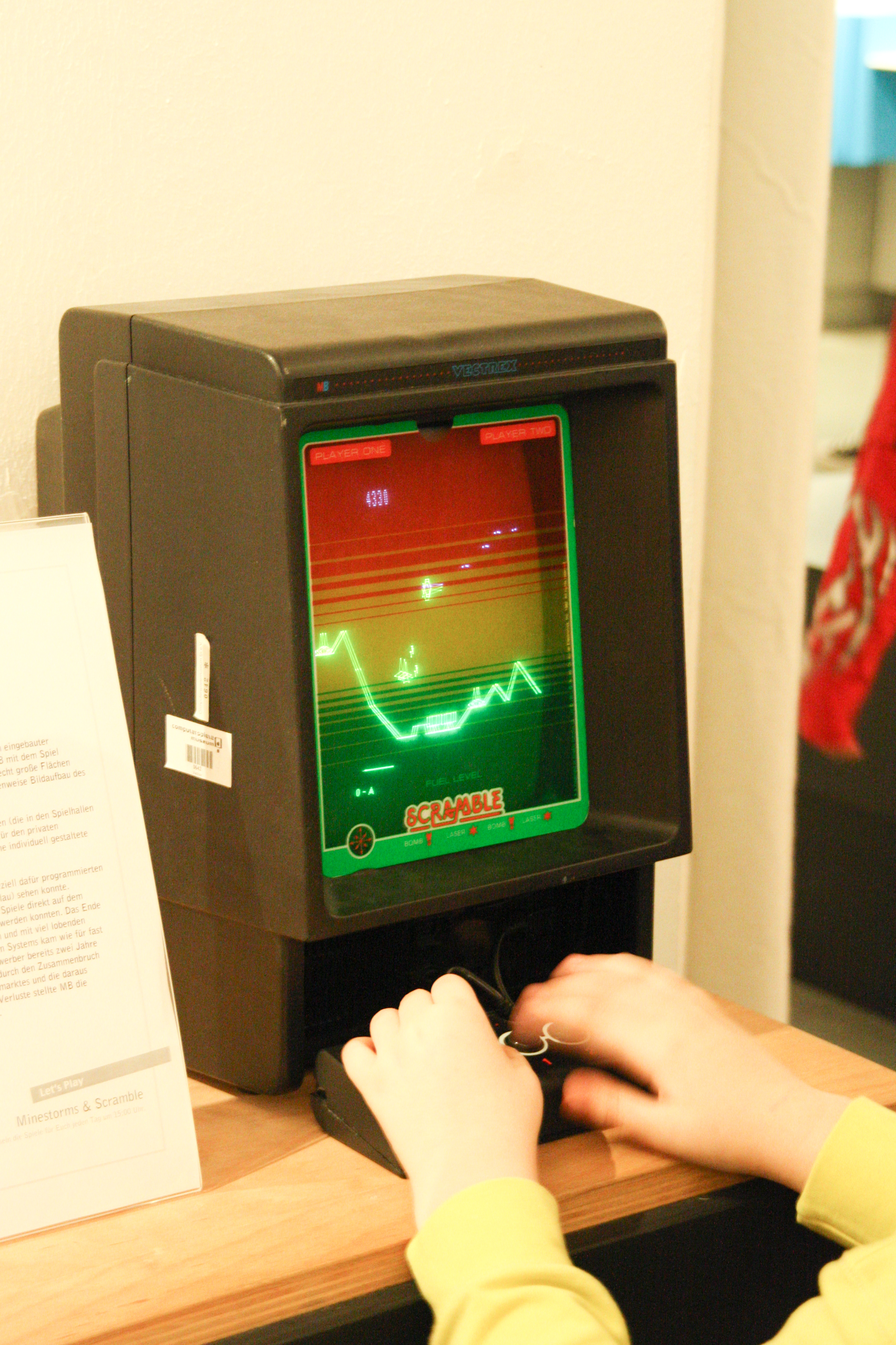 Computerspielemuseum 13